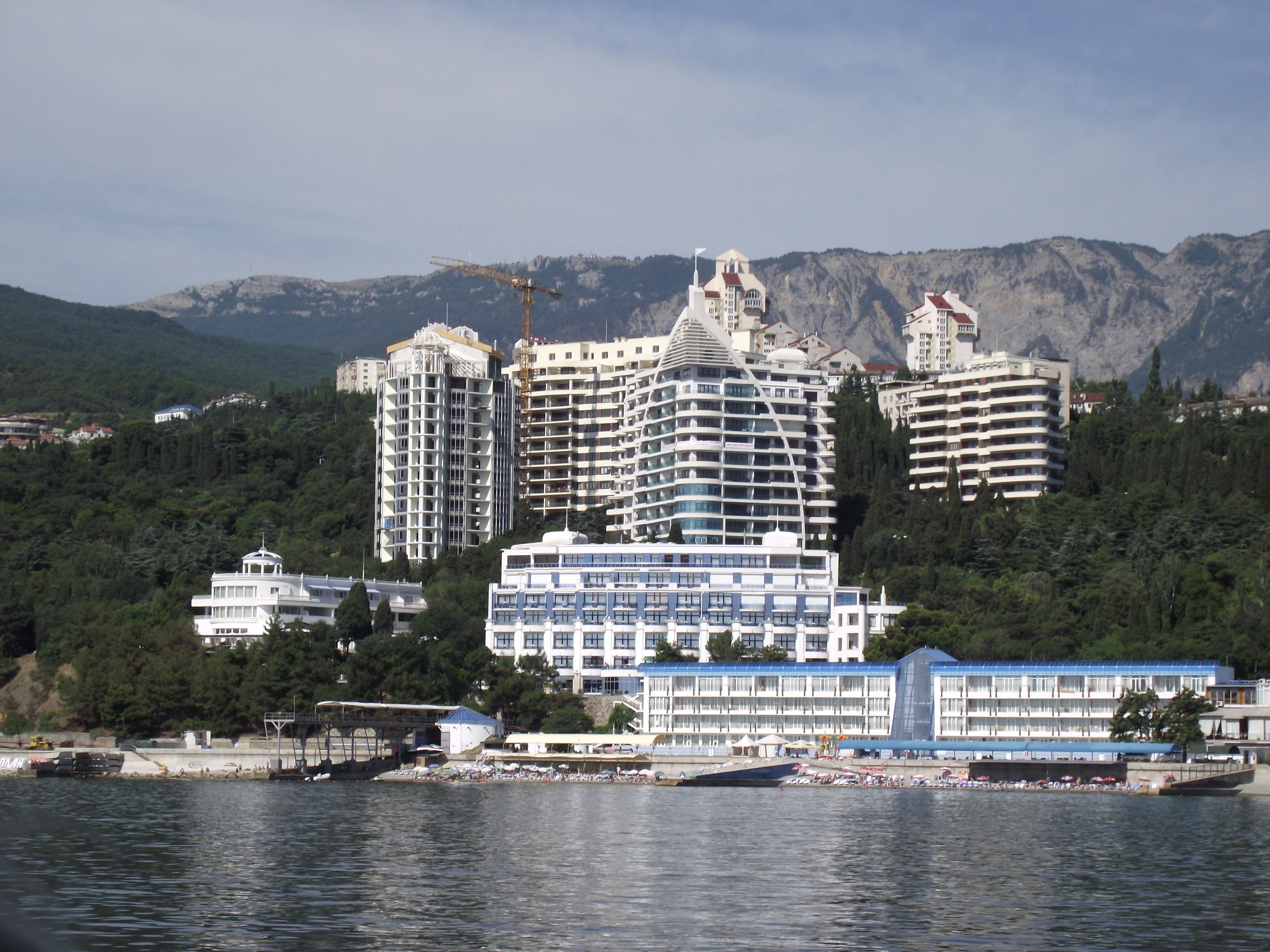 Отель Левант и и ялтинские новостройки